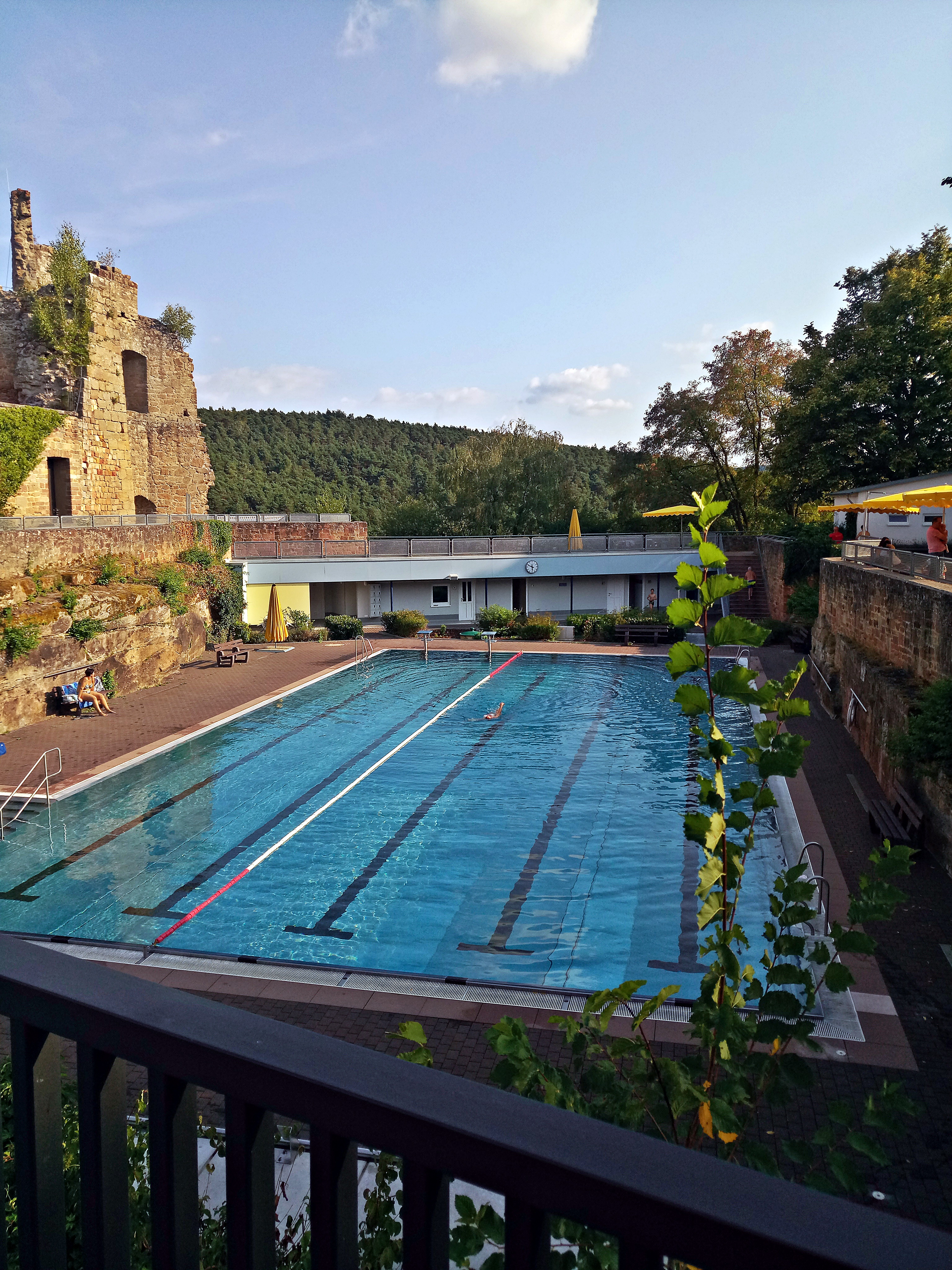 Burg Altleiningen, ehem. Burggraben, Schwimmbad